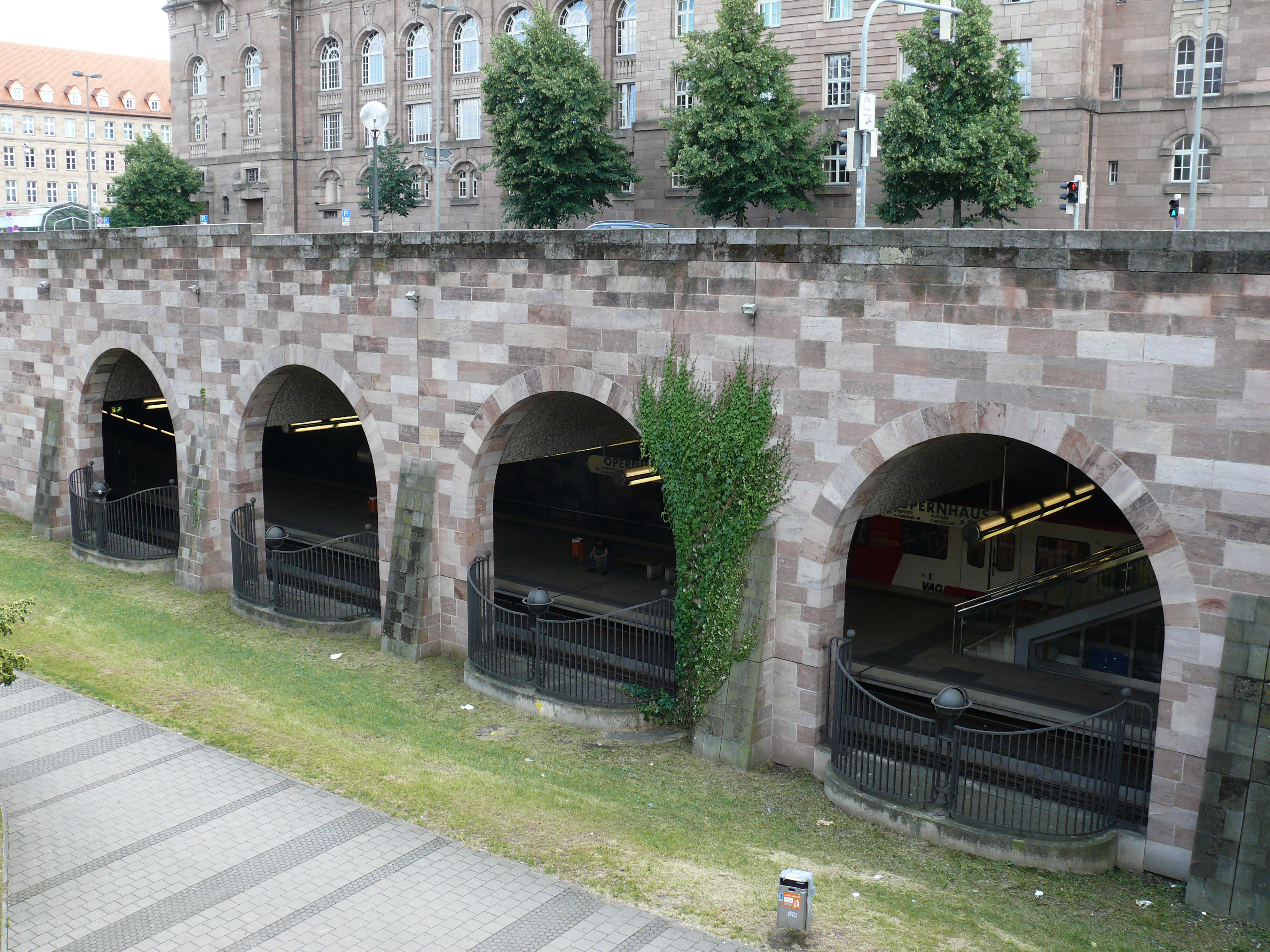 Blick in den U-Bahnhof Opernhaus in Nürnberg, der zur Seite hin offen ist.